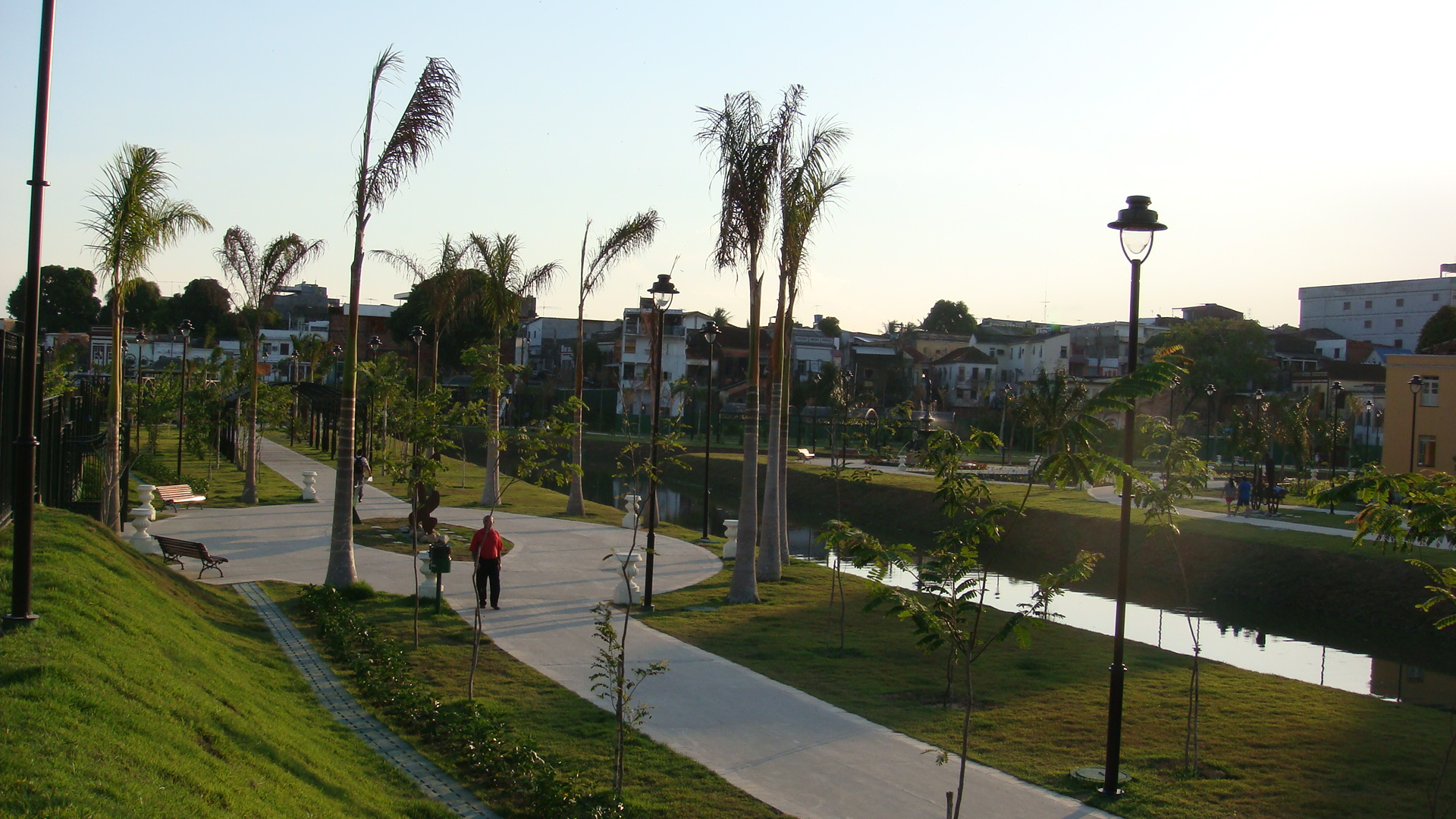 Largo Jefferson Peres em Manaus